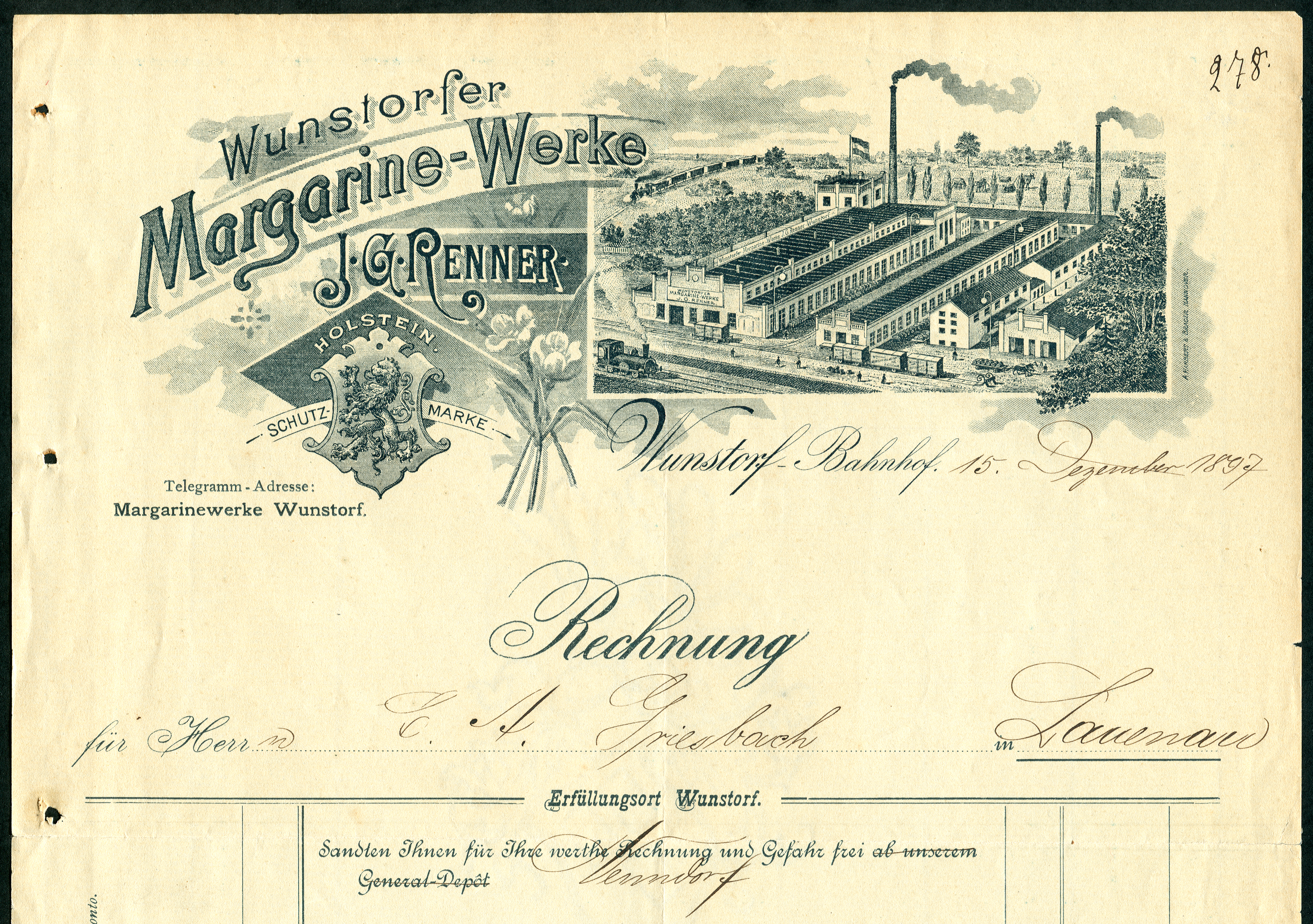 Die Wunstorfer Margarine-Werke J. G. Renner in Wunstorf am Bahnhof waren die Vorläufer der späteren Margarinewerke Union GmbH. Der Briefkopf des hier teil-digitalisierten Rechnung zeigt, neben der "Schutzmarke Holstein", eine Vogelschau über die Fabrik mit den Bahngleisen und Eisenbahnen sowie weidenden Kühen im Hintergrund. Das Blatt, etwas größer als DIN A4 und mit Wasserzeichen "Fein Wappen-Post" unter großem Wappen, wurde von der in Hannover ansässigen Firma A. Harbers & Brager gedruckt und am 15. Dezember 1897 an E. A. Grießbach in Lauenau gesandt. In Rechnung gestellt wurden "2 Kübel Süßrahm-Margarine Extra" und 1 Kübel der Sorte "Fein" für zusammen 70. Mark.